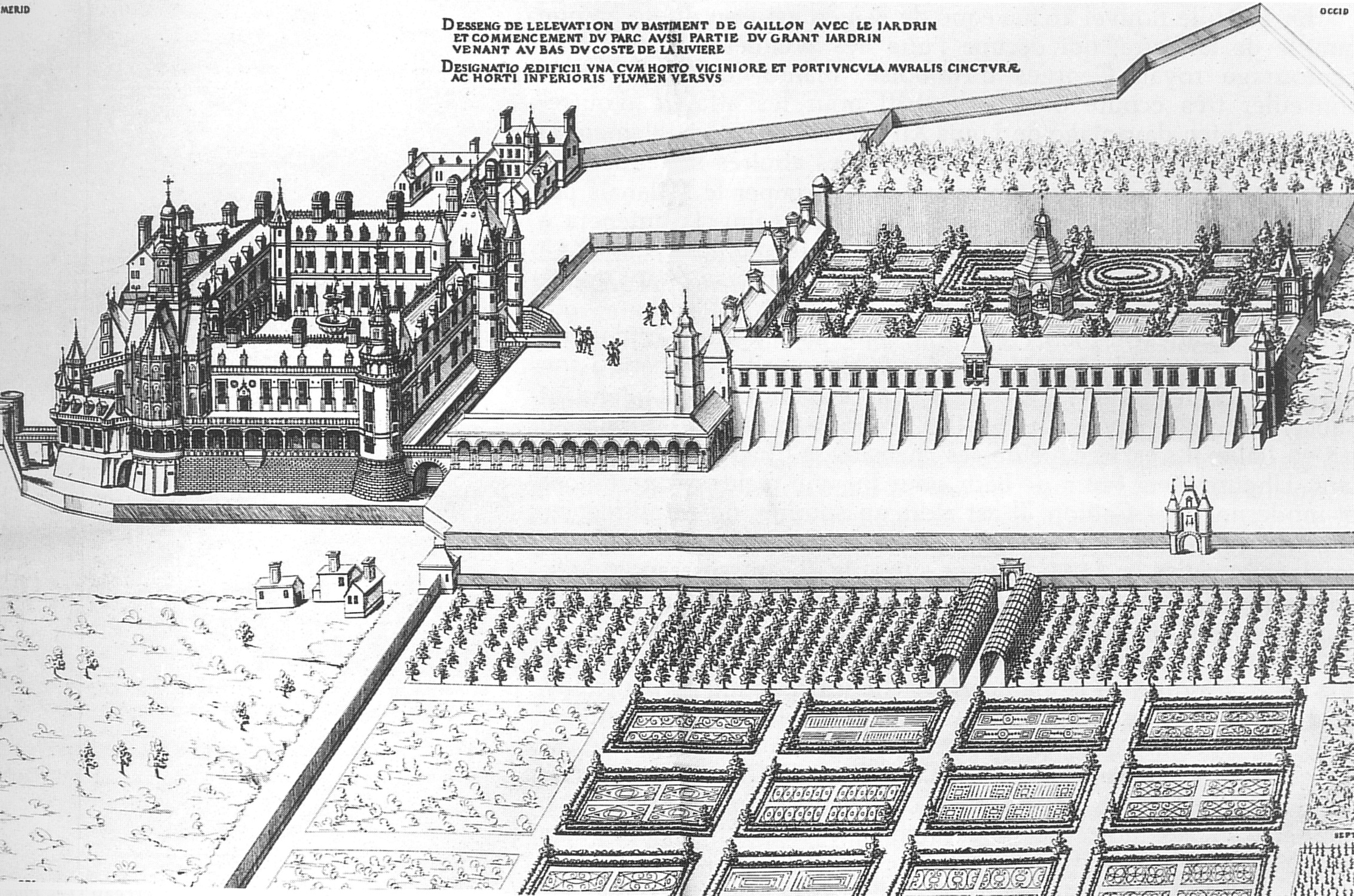 Übersichtszeichnung des Schlosses Gaillon